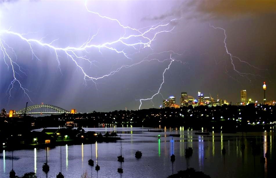 Sydney Lightning